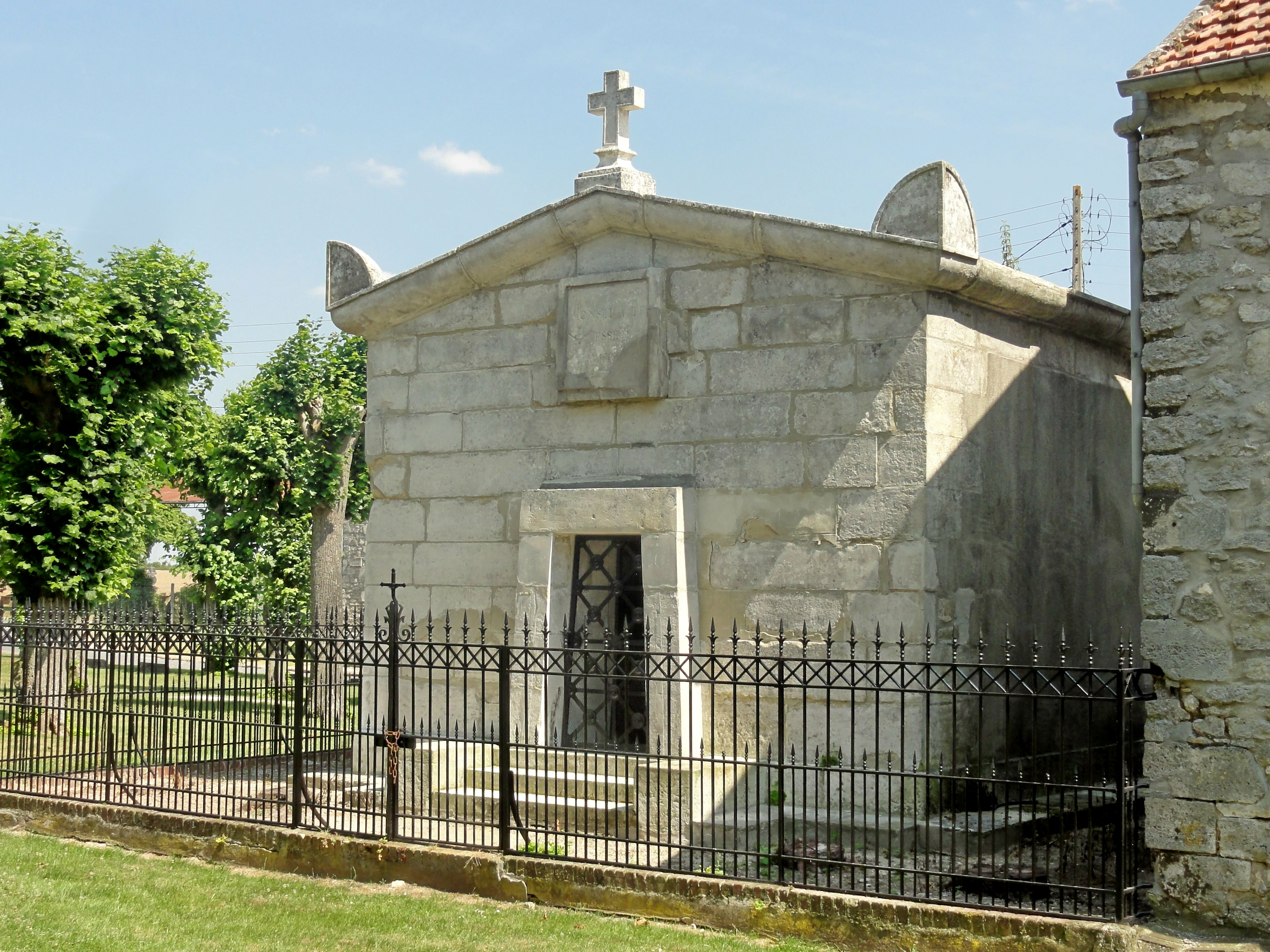 Chapelle funéraire devant le chevet.